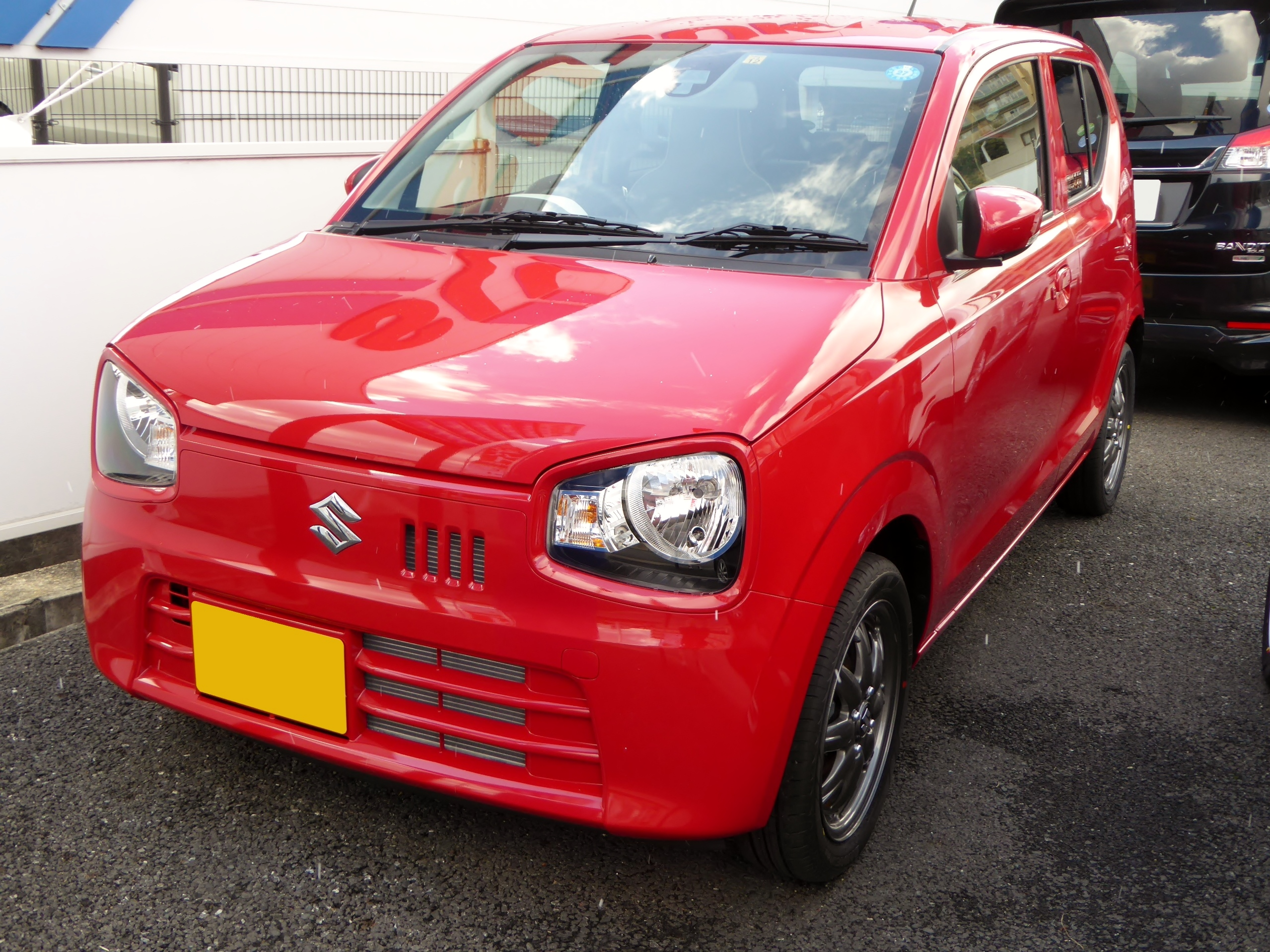 HA36S型スズキ・アルトXの2トーンバックドア仕様をフロントから撮影。